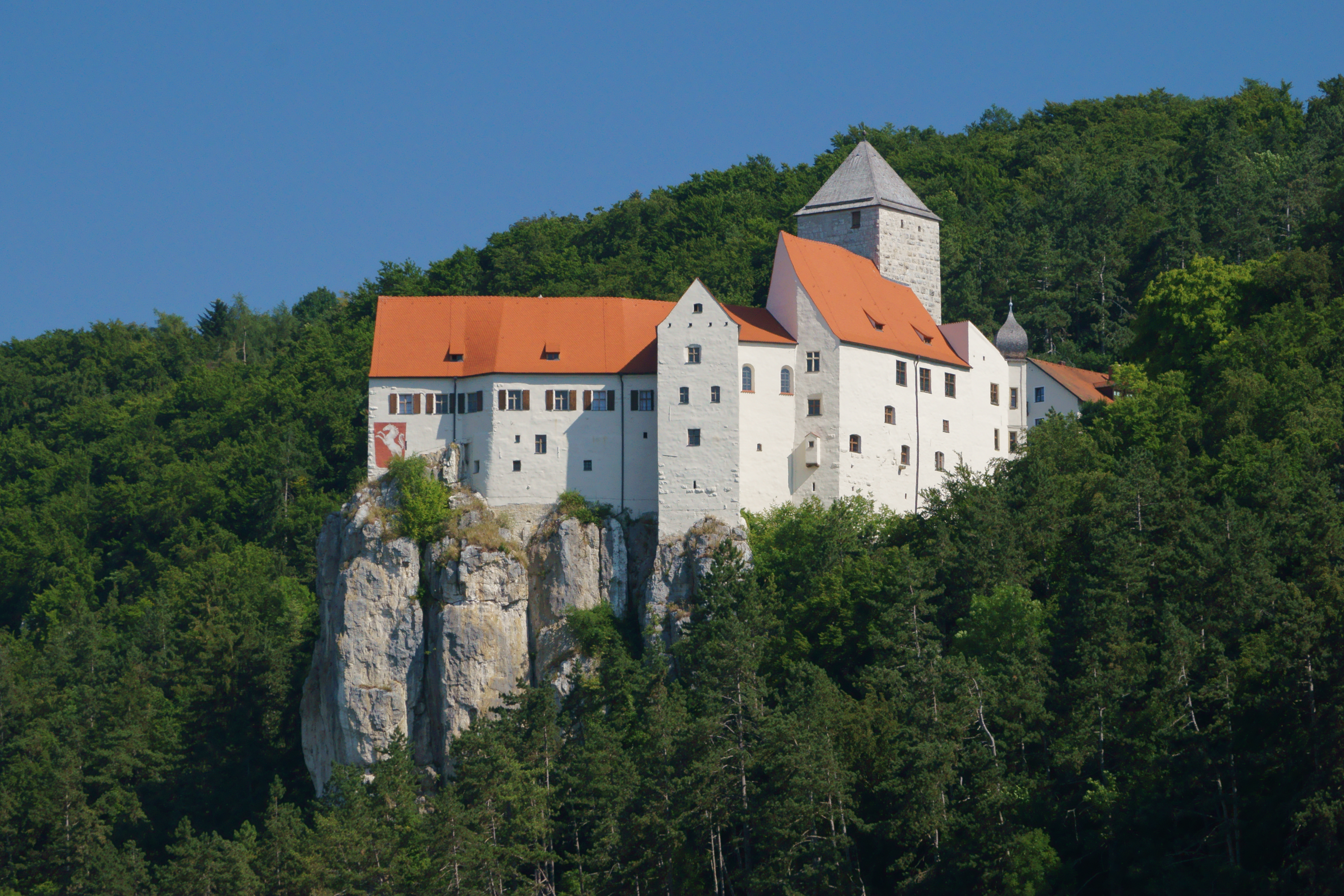 Schloss Prunn von Süden aus gesehen.